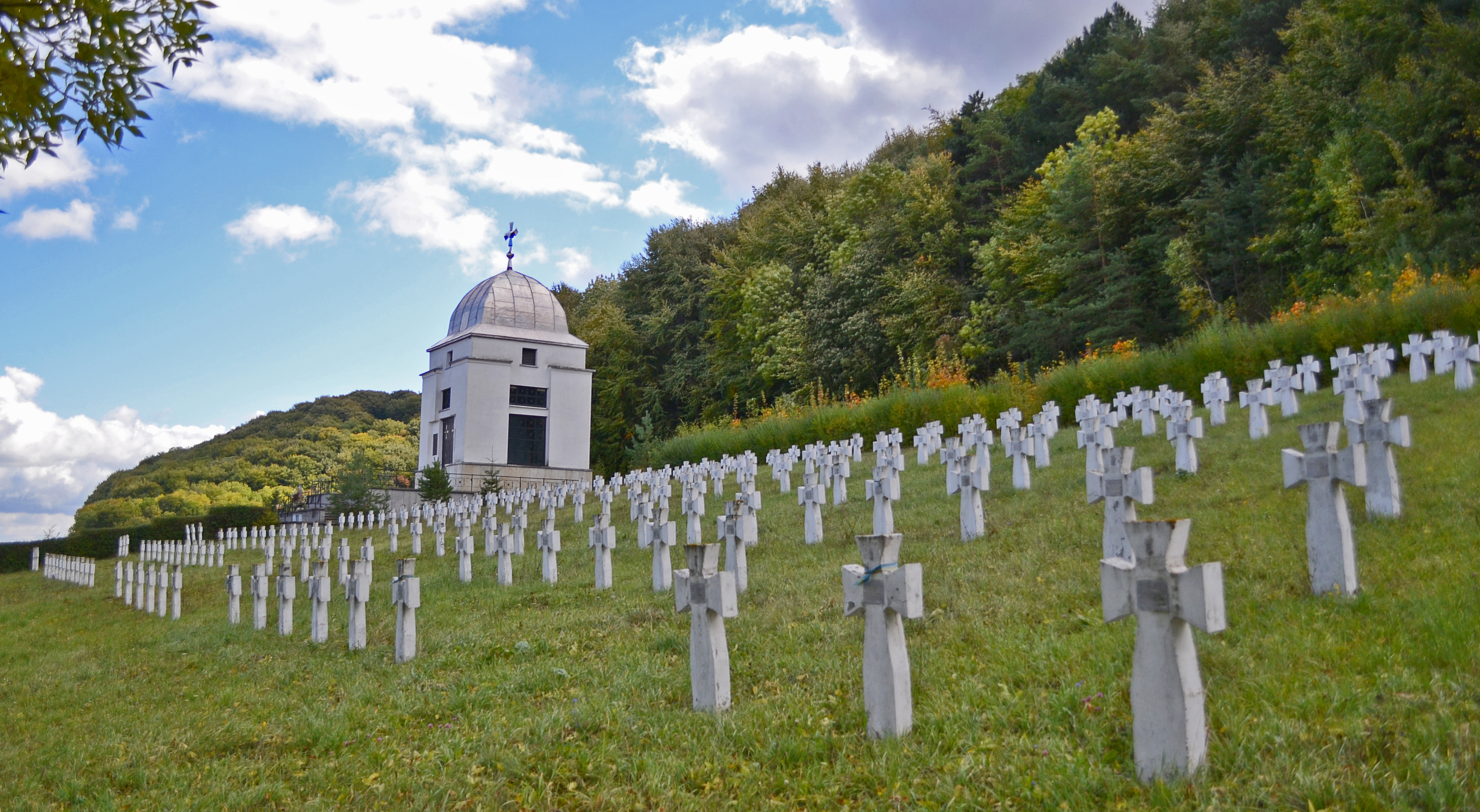 Меморіал воїнів І Української дивізії “Галичина” (пам., 1997, мармурова крихта), с.Червоне, кладовище